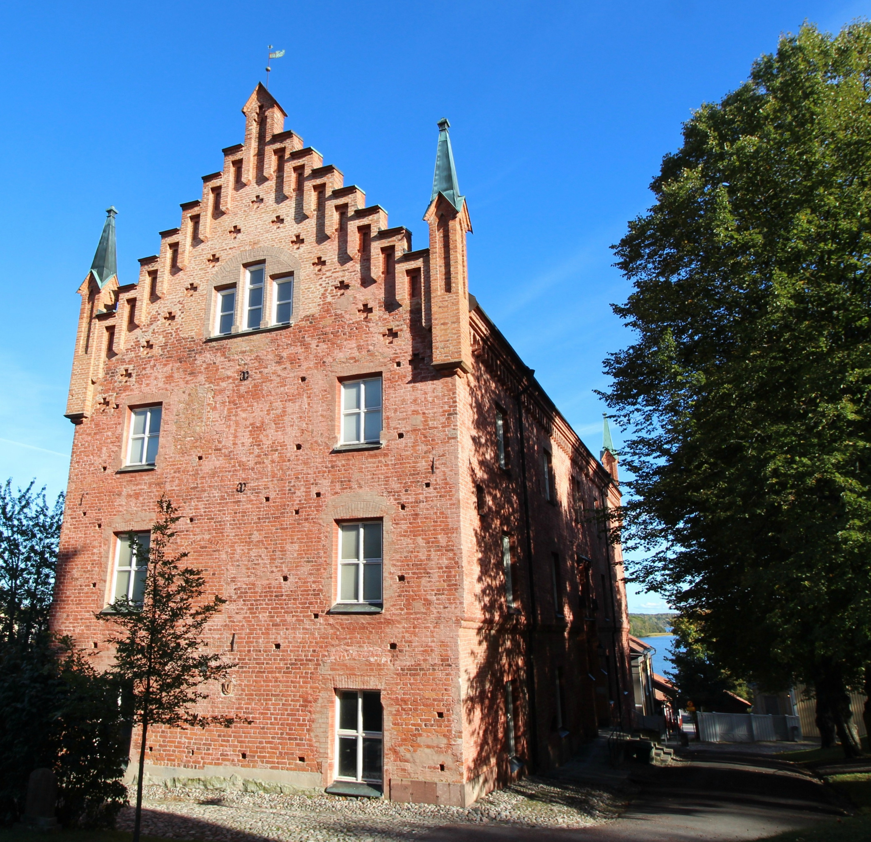 Strängnäs, biskopspalatset Roggeborgen